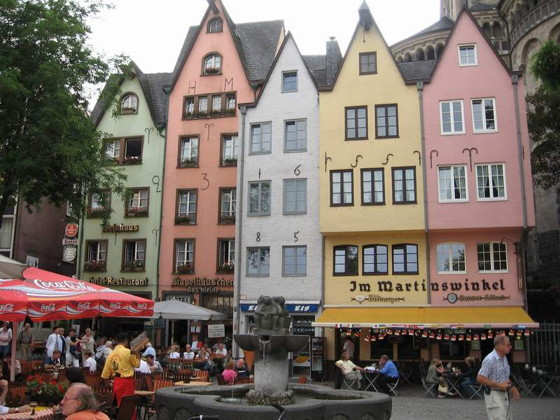 O stradă cu lucuinţe medievale din Köln.